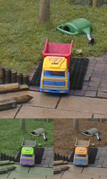 Speelgoedvrachtwagen in het gras (eigen foto). Linksonder: zoals een rood-kleurenblinde de foto boven ziet, rechtsonder: zoals een groen-kleurenblinde de foto boven ziet. Beschikbaar gesteld onder GFDL. Het programmacodefragment dat het segment linksonder afleidt is het volgende: if (iOp == OP_DI1){ // zoals een rood-kleurenblinde het ziet /* herverdelen over twee kanalen: */ double fC1= .33 * fR + .67 * fG; double fC2= fB; /* terugvertalen naar onze drie kanalen: */ fR= (fC1 + fC2) * .5; fG= fC1; fB= fC2; Aangezien een rood-kleurenblinde kleur waarneemt via twee kanalen ('middengolf' en 'kortegolf') wijzen we het kleurenspectrum toe aan twee variabelen, c1 en c2, die vanuit het oogpunt van de kleurenblinde uiteraard complementair zijn. Om dit voor een driekanaalswaarnemer zichtbaar te maken, moeten deze twee kanalen zodanig over drie worden verdeeld dat ook daar twee complementaire kleuren ontstaan. Het resultaat is een tweedimensionale kleurenruimte met mengkleuren van groen en magenta via grijs en in variabele intensiteit. Voor groen-kleurenblindheid geldt iets dergelijks; de complementaire kleuren zijn daar oranje en blauw.